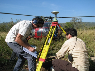 Implantation d’un réseau géodésique matérialisé pour la création de barrages sur le Nil.